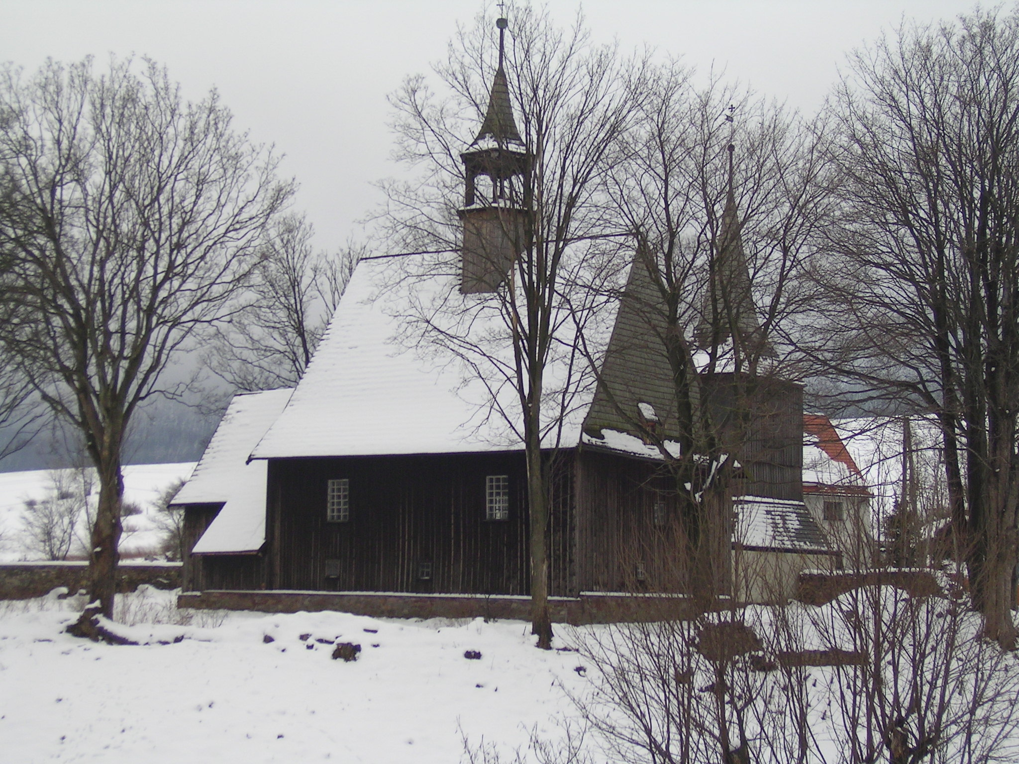 Kościół Św. Jadwigi Śląskiej w Rybnicy Lesnej z 1608 r.